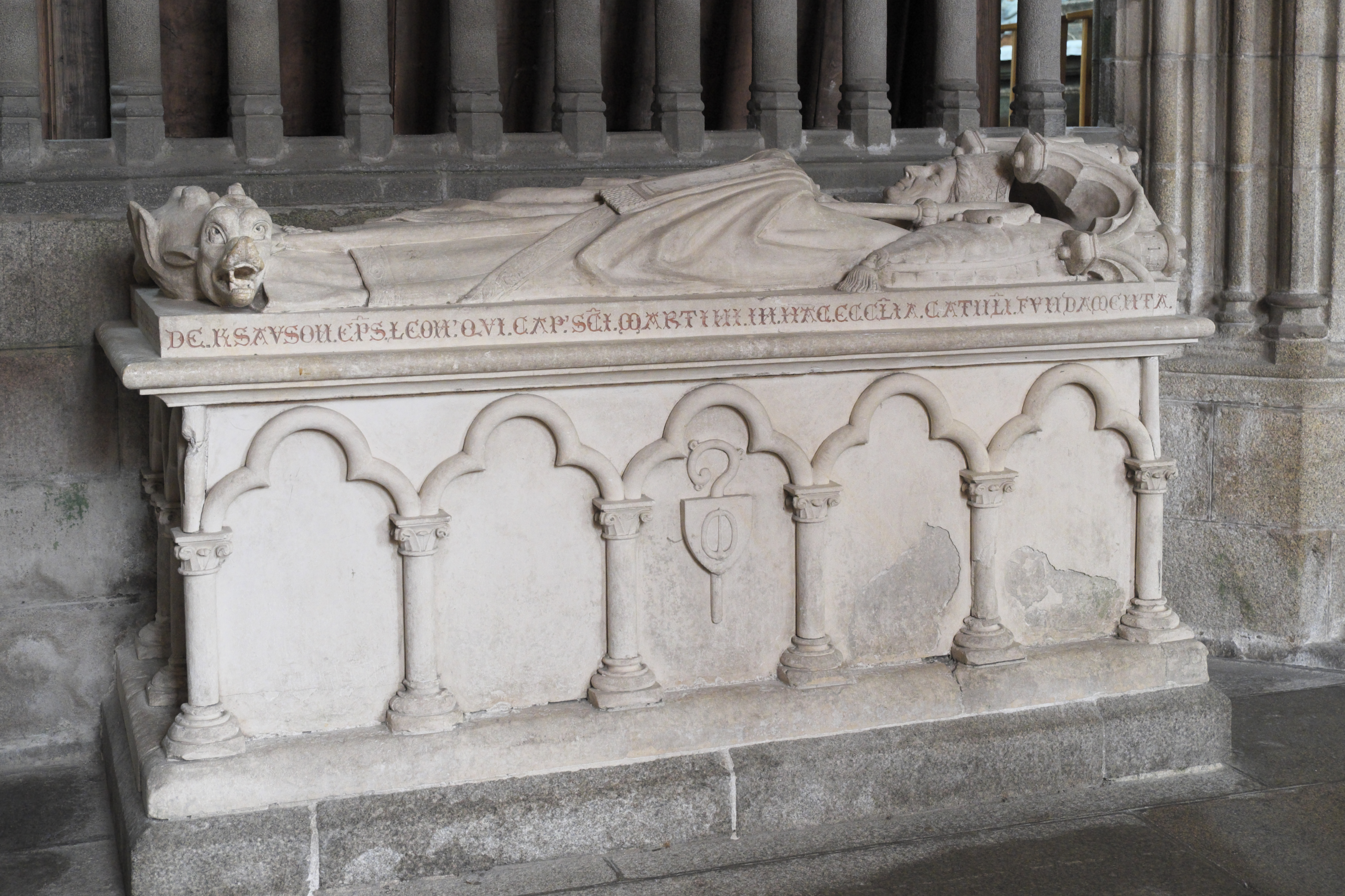 Ehemalige Kathedrale Saint-Paul-Aurélien in Saint-Pol-de-Léon im Département Finistère (Region Bretagne/Frankreich), Grab des Bischofs Guillaume de Kersauzon († 1327)